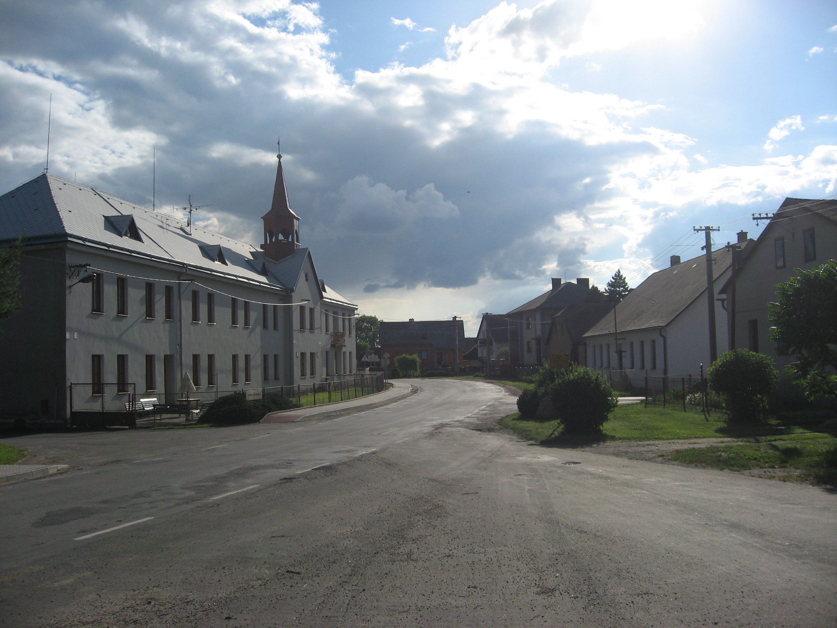 Ždírec, okres Jihlava